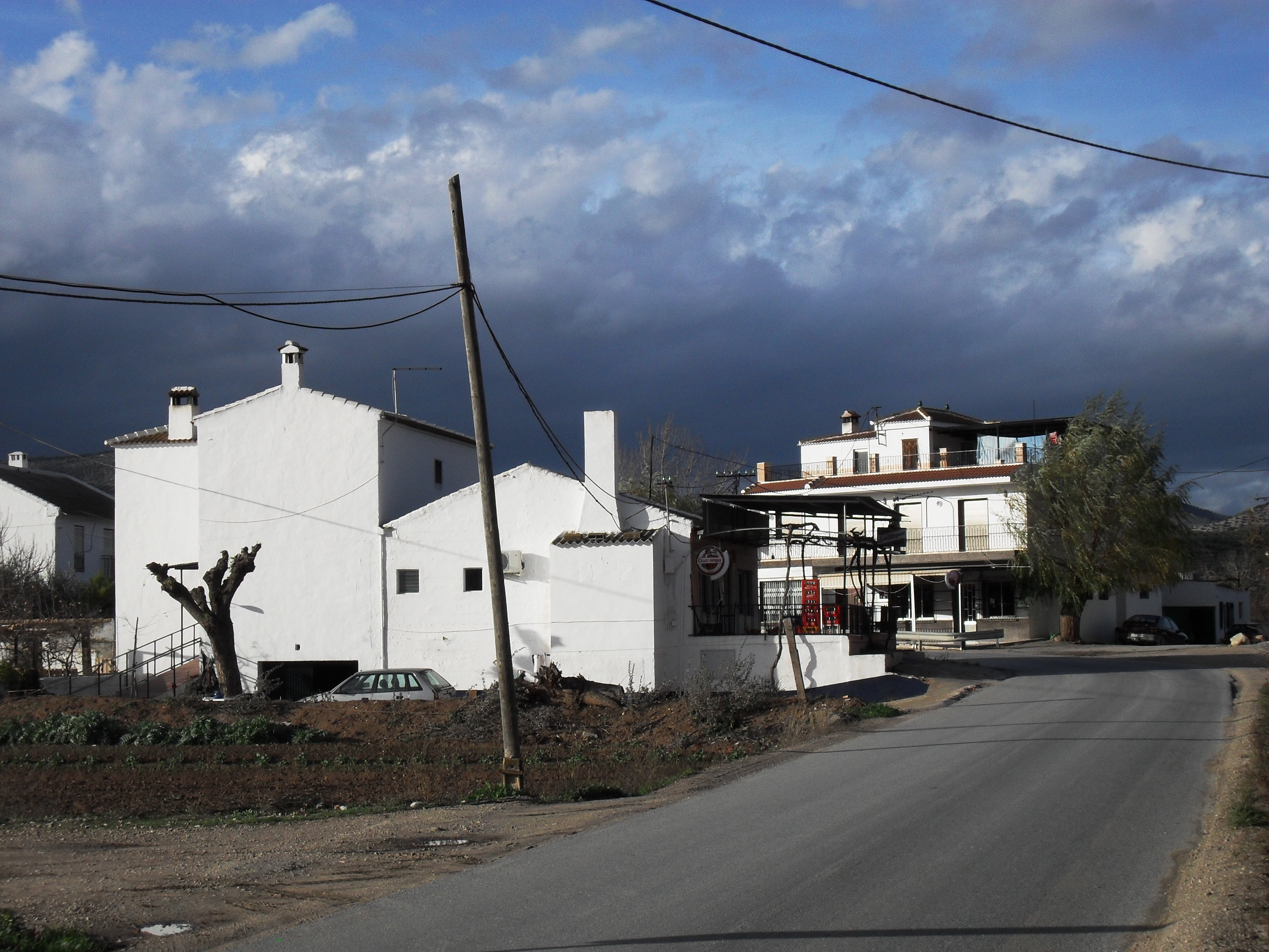 Vista parcial del Caserío de El Cárcamo desde la GR-4002.